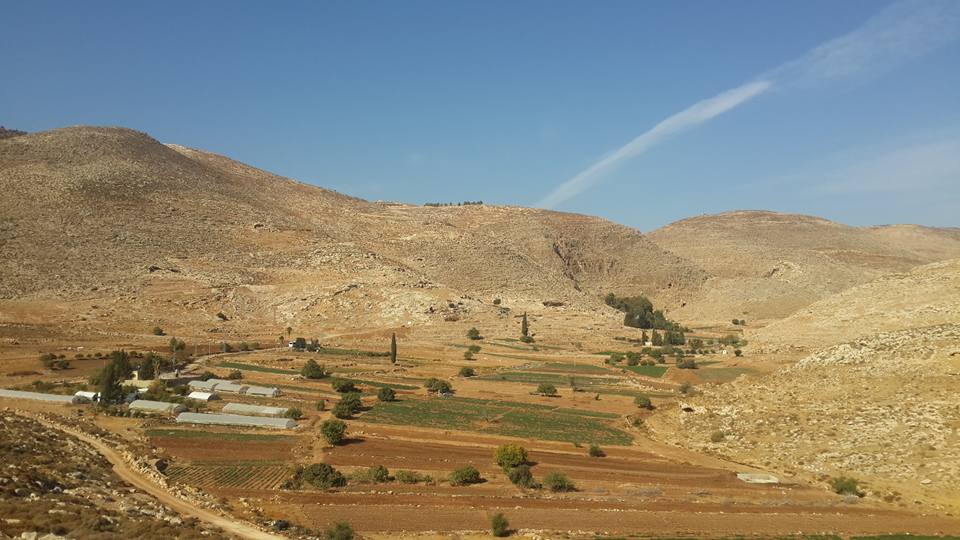 تقع عين سامية شمال شرق رام الله، بالقرب من قرية كفر مالك، المنطقة غنية بالآبار والمياه الجوفية